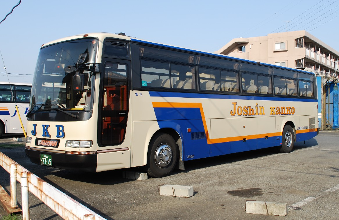 上信観光バス2715号車。上信観光バス営業所敷地外（公道上）より撮影。上信観光バスの従来塗装車両。